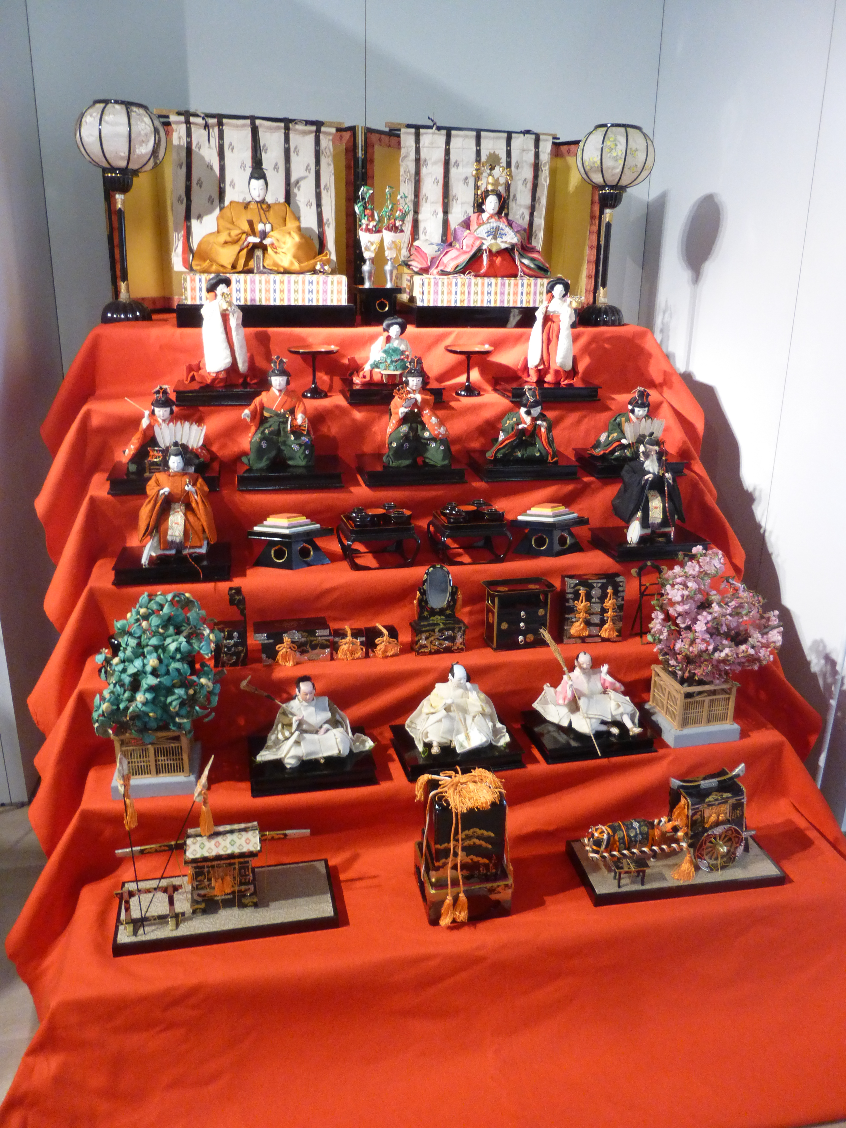 Roma, Istituto giapponese di cultura. L'altare della festa delle bambole. La festa (Hina matsuri) si celebra il 3 marzo di ogni anno, all'arrivo della primavera. Nata da antichi riti di purificazione, la ricorrenza è dedicata ad augurare sana crescita e felicità per le ragazze. Le bambole rappresentano personaggi della corte (dalla coppia Principe e Principessa in alto fino ai giardinieri), e un insieme di oggetti lussuosi e benauguranti: alberi (mandarancio e ciliegio in fiore), ricche suppellettili, attrezzature da viaggio.